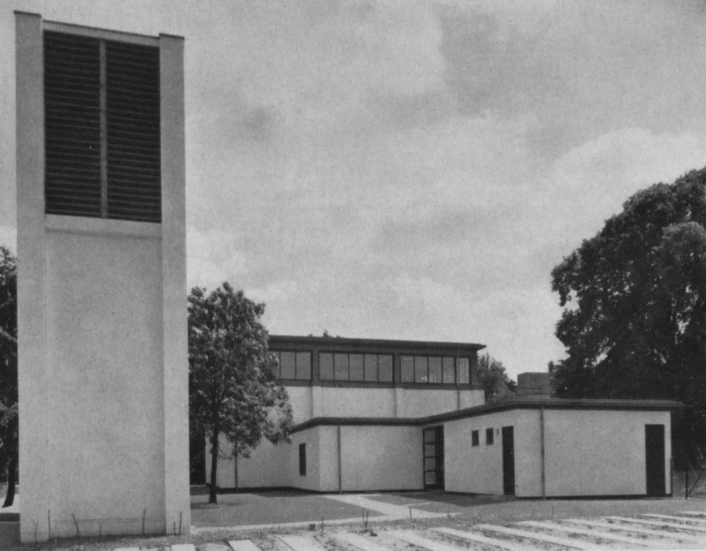 Ansicht auf den Campanile und die Kirche mit ihren beiden Anbauten